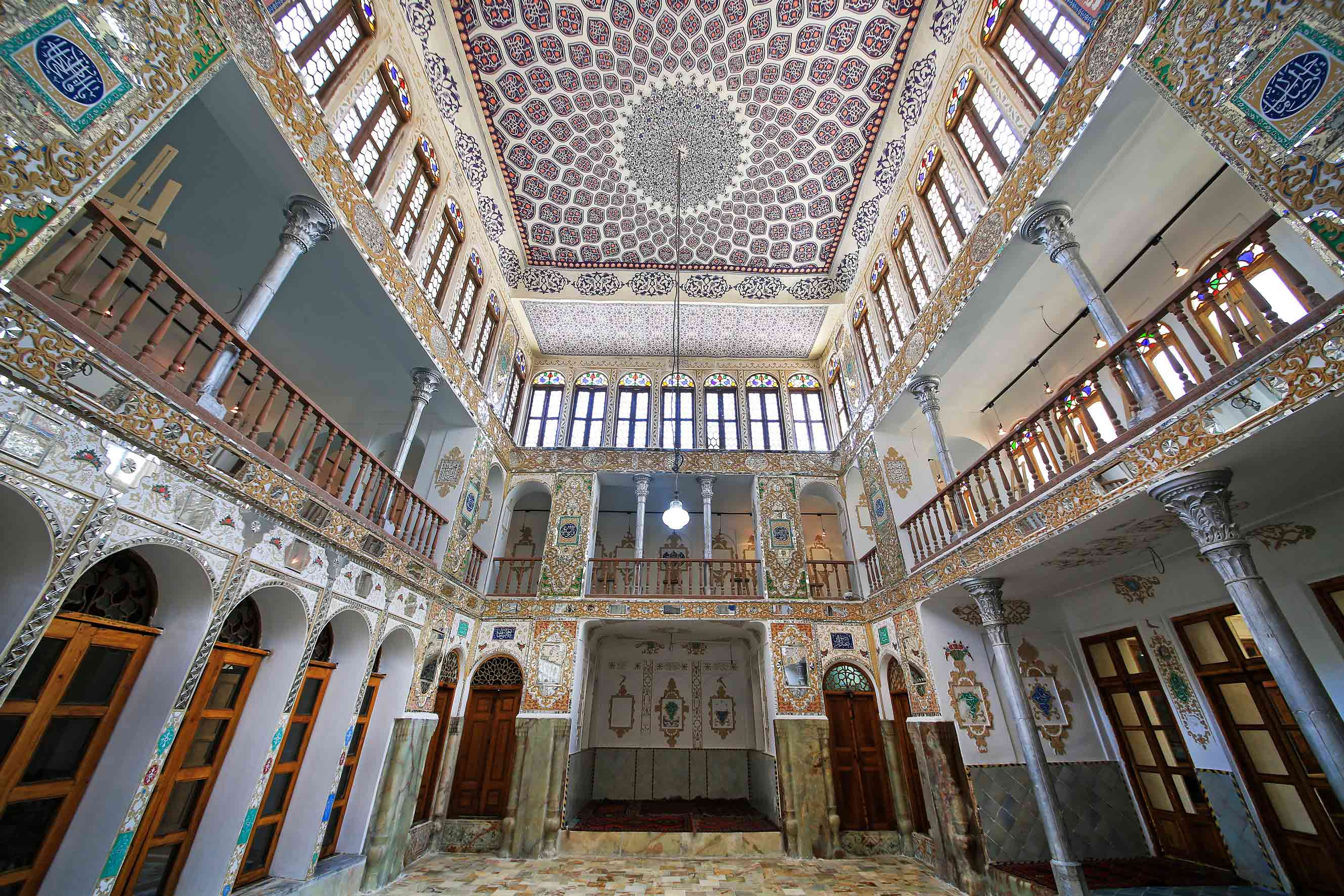 فضای نگارخانه